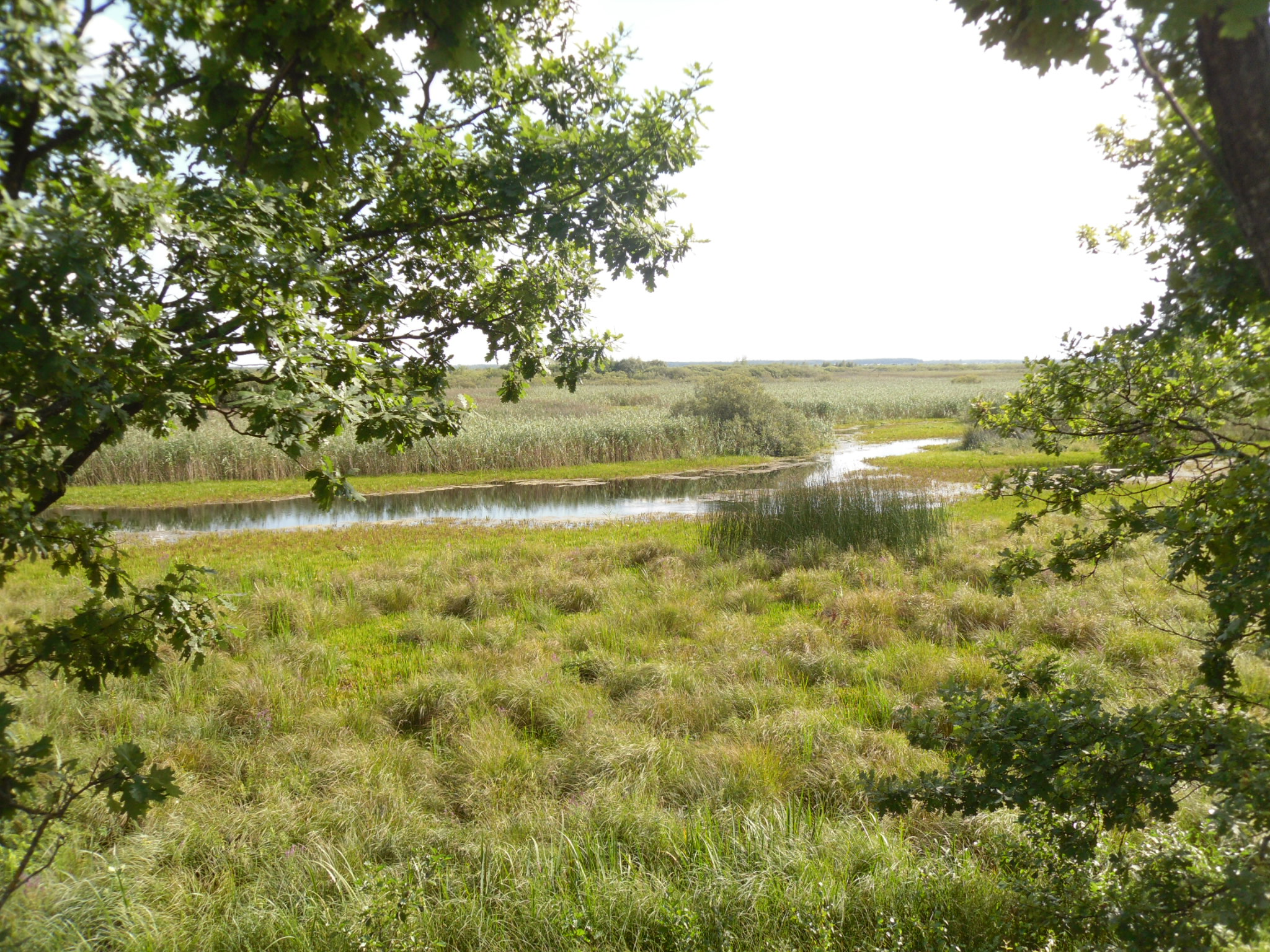 «Прип'ять-Стохід», Любешівський р-н, ДП «Любешівське ЛМГ», ДП СЛАП «Любешівагроліс», с/р